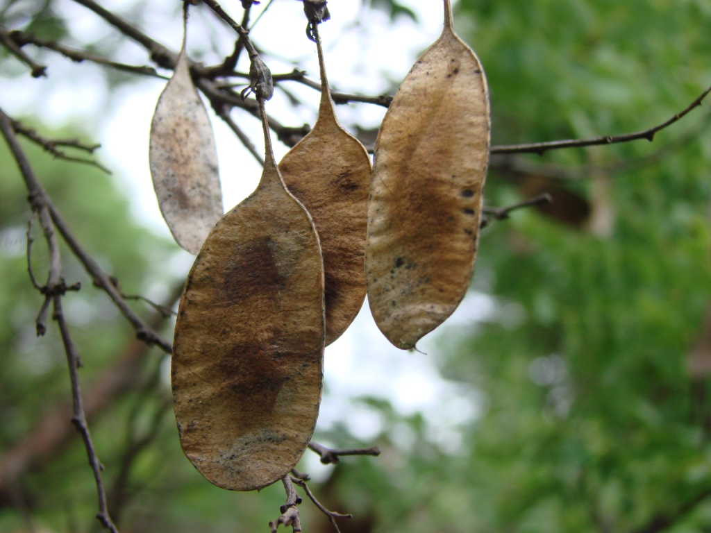 Dalbergia miscolobium - FABACEAE Parque da Cidade - Brasília - Distrito Federal - Brasil.